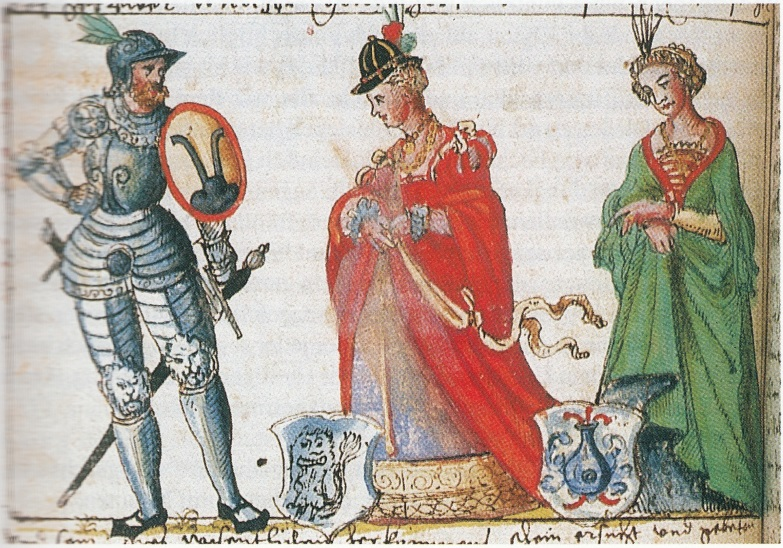 Walther Eisenberger Sein Ehegemahl war Joanna gen. Genet geb.Gravin von Thonri aus Frsnckreich bürtig und Burgundt und N. Blummin Geschlechterin von Franckfurth